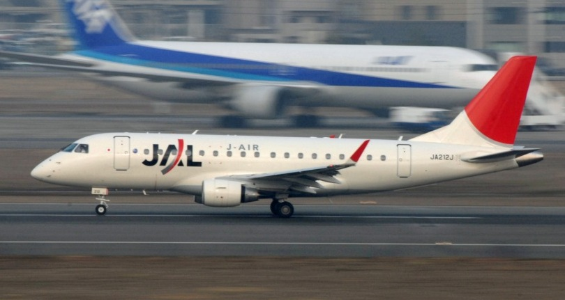 ジェイ・エア エンブラエルERJ１７０－１００STD(JA212J) 福岡空港にて